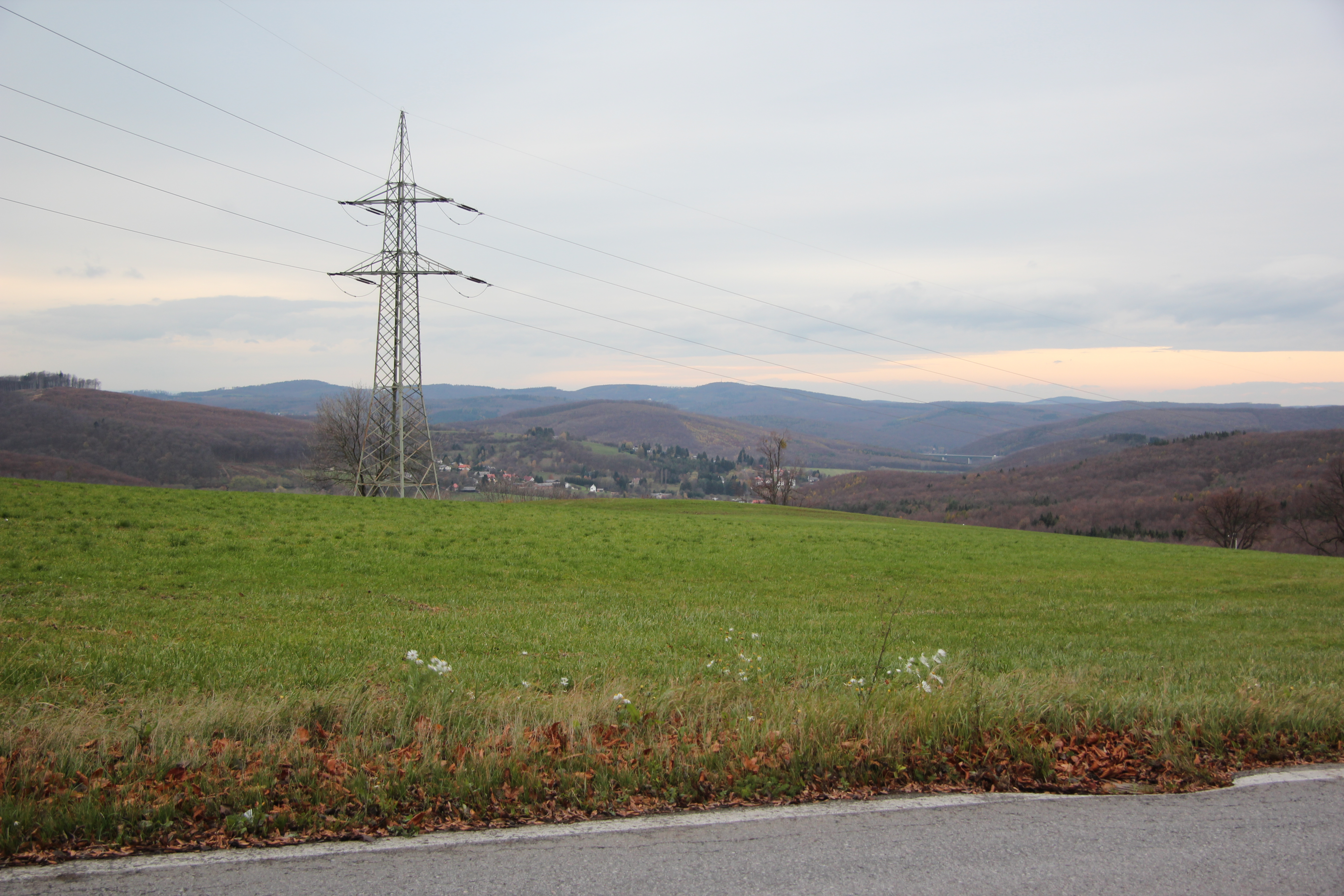 Blick von Hochroterd (Breitenfurt) Richtung Wolfsgraben, im Hintergrund A1 Talübergang bei Wienerwaldsee